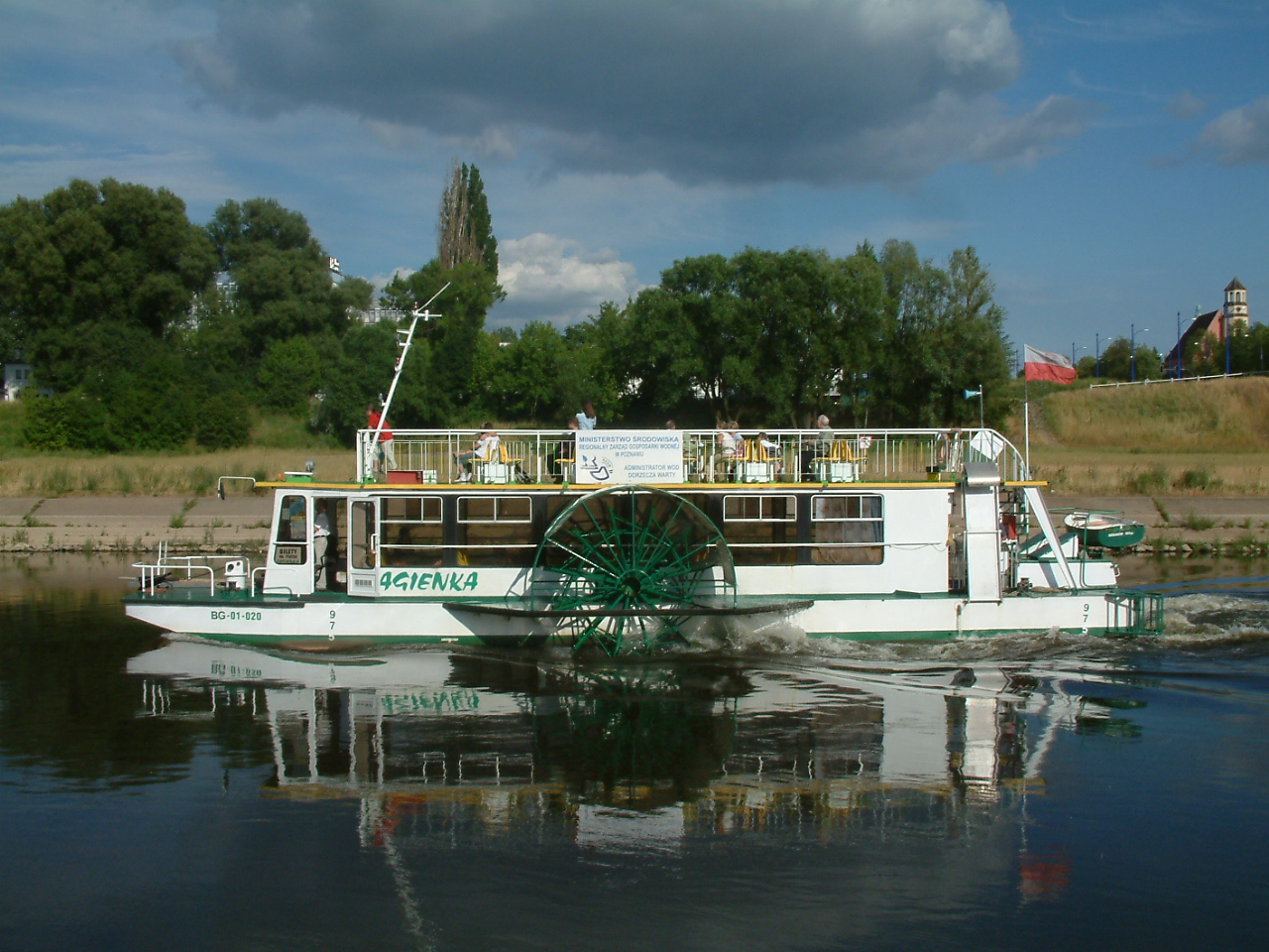 Jagienka